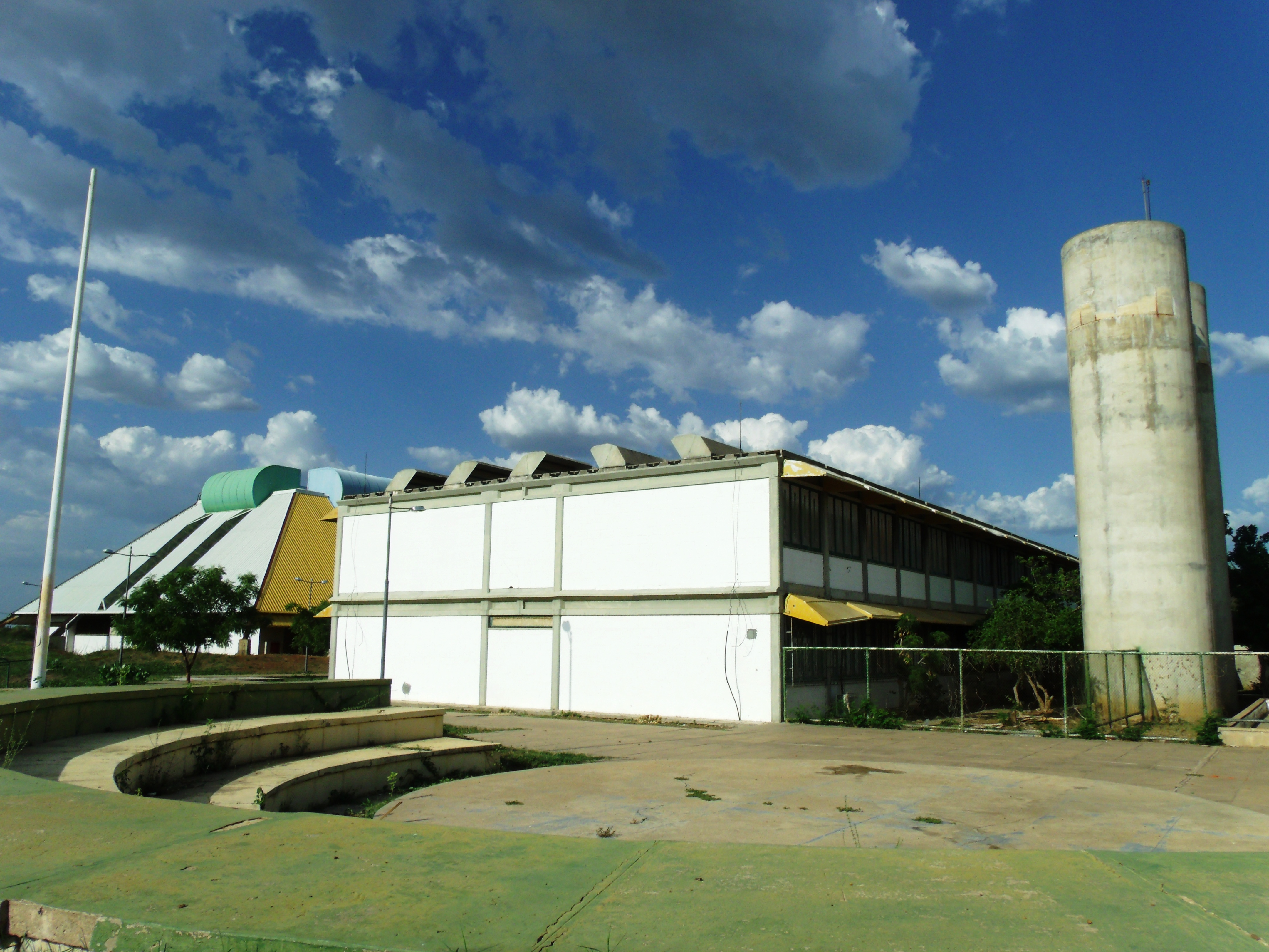 Vista pacial de um CAIC - Centro Integado de atenção à Criança ou Centro de Apoio à criança e ao Adolescetente em Campo Maior, no Piauí.